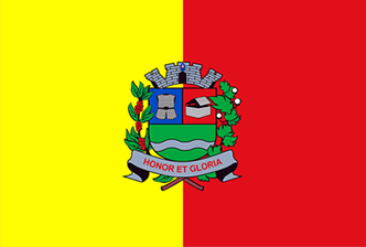 Bandeira de Mogi Guaçu SP